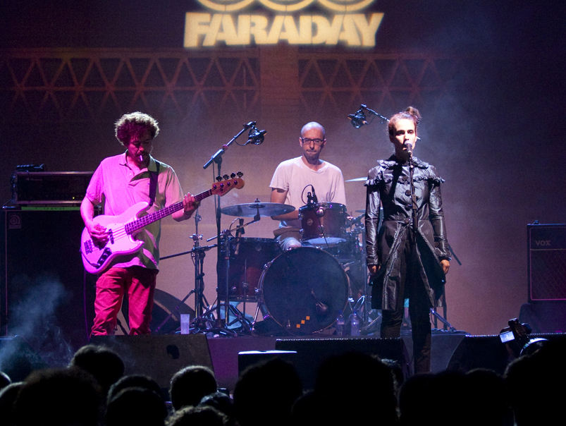 Los Punsetes